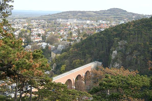 Aquädukt der Wiener Wasserleitung bei Mödling. Blick vom Schwarzen Turm, im Hintergrund die Höhere Technische Lehranstalt von Mödling mit dem Naturschutzgebiet am Eichkogel. selbst fotografiert 12.4.2004 (GNU) --K@rl 18:22, 4. Okt 2004 (CEST)